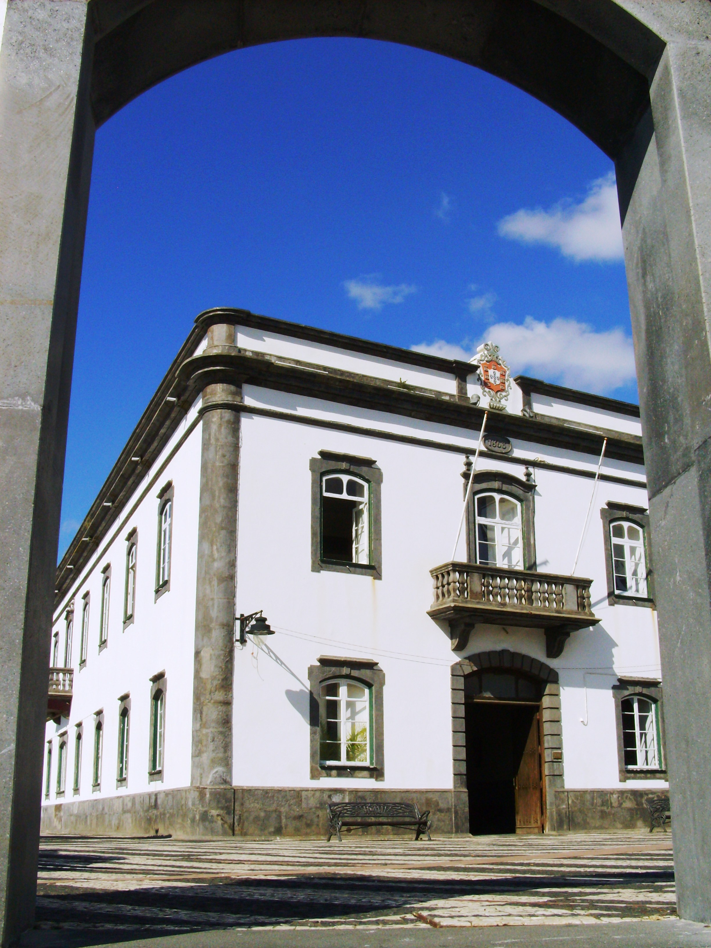 Portas da Cidade, Angra do Heroísmo, Ilha Terceira, Açores: edifício da antiga Alfândega.